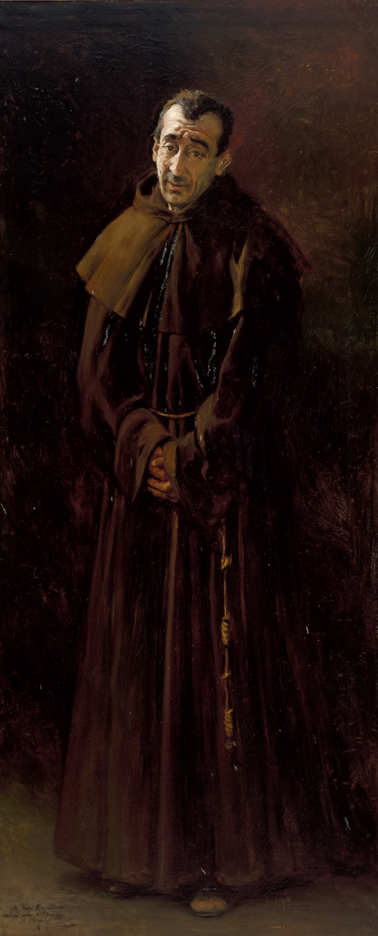 Retrato del actor español José García-Requelme y Venero (1865-1905).